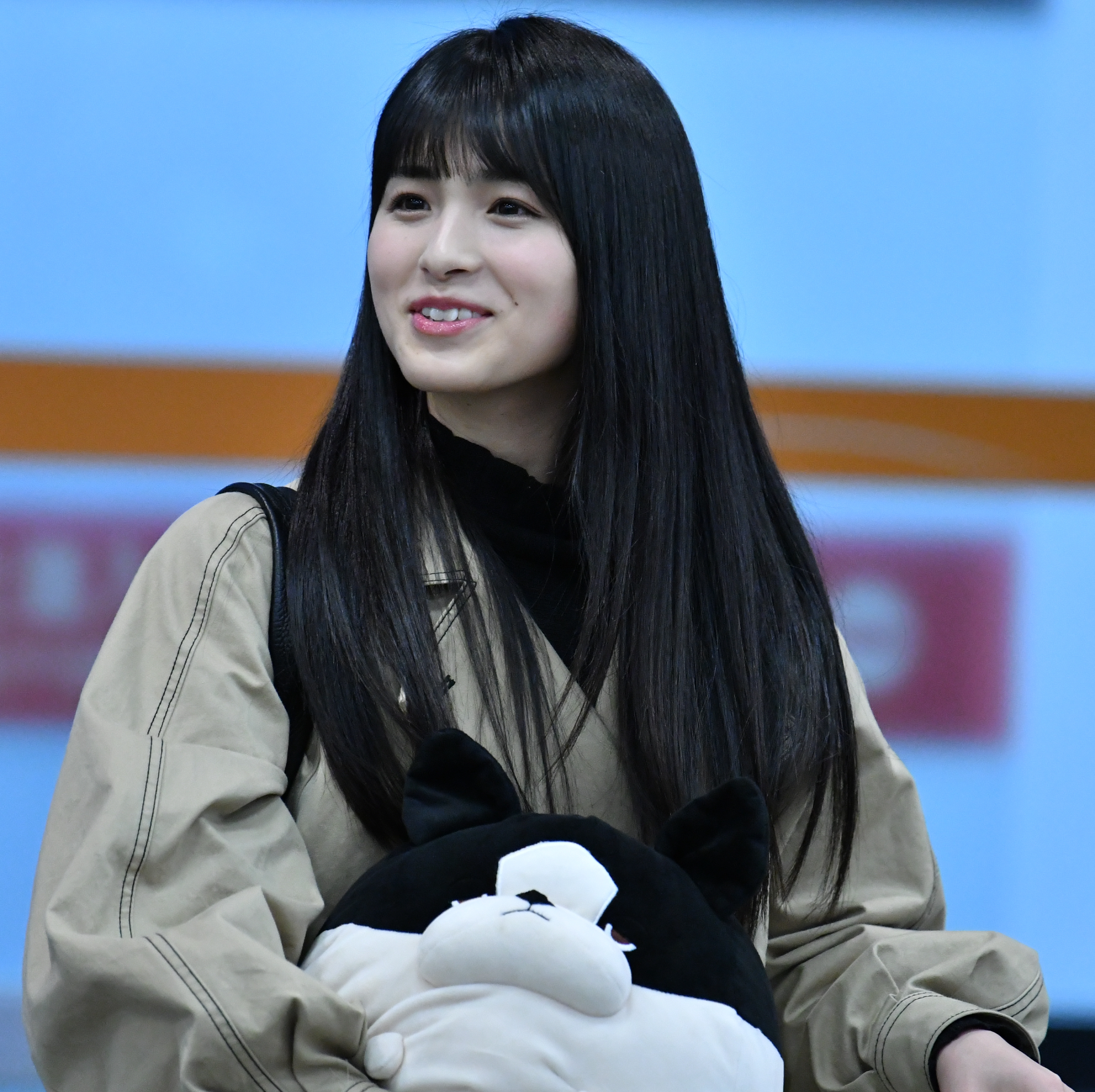 乃木坂46成員在台北國際松山機場。